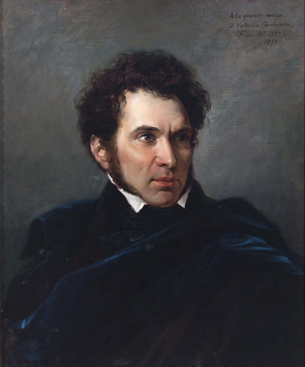 Retrato del pintor, coleccionista, escritor y arqueólogo español Valentín Carderera (1796-1880).